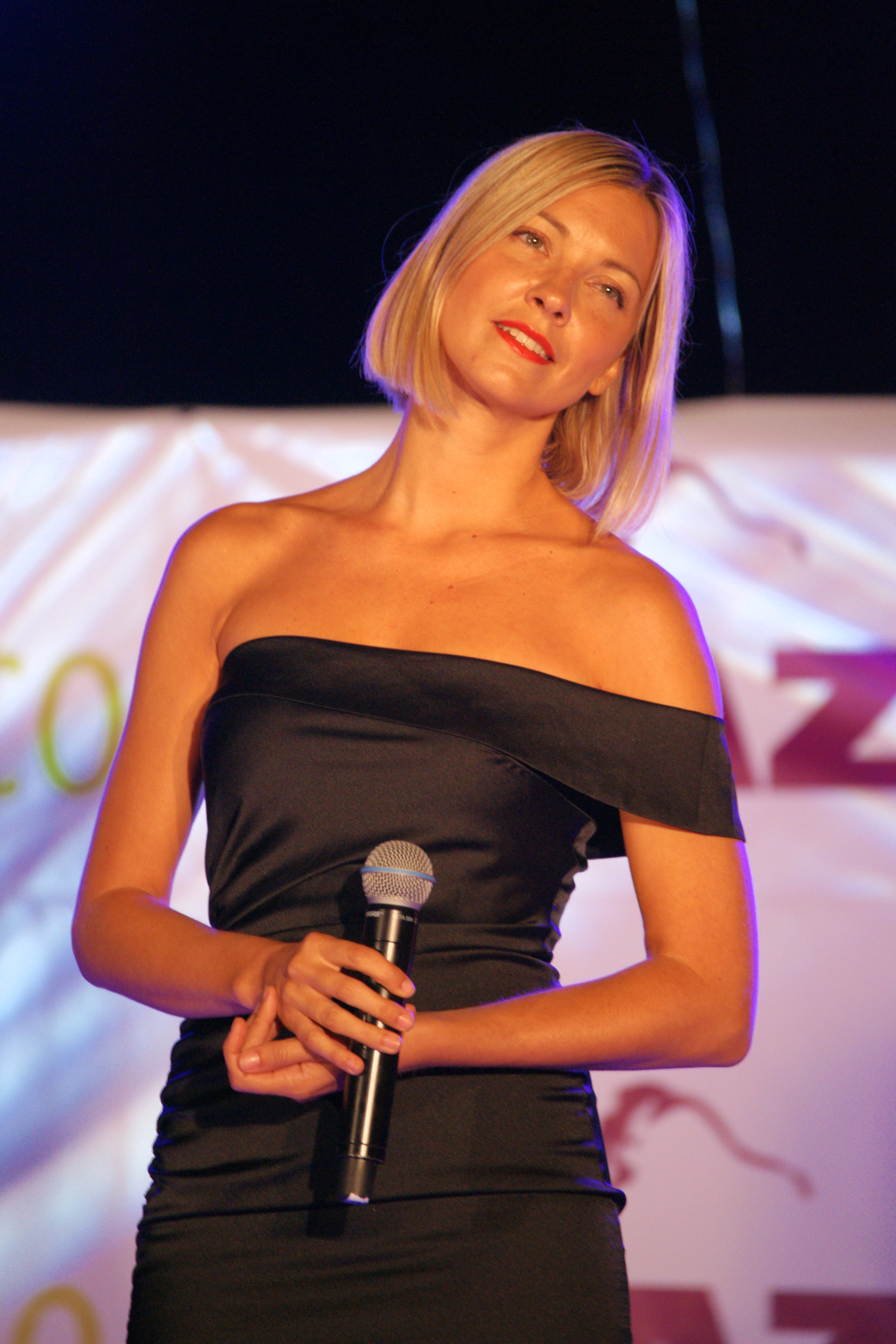 Julie Erikssen, Coartjazz 2018, Coaraze